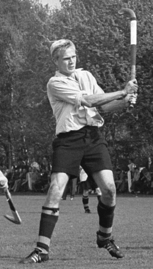 Hockey kampioenschap Laren tegen Hattem 3-0 achter Kik Tholen (juichend)